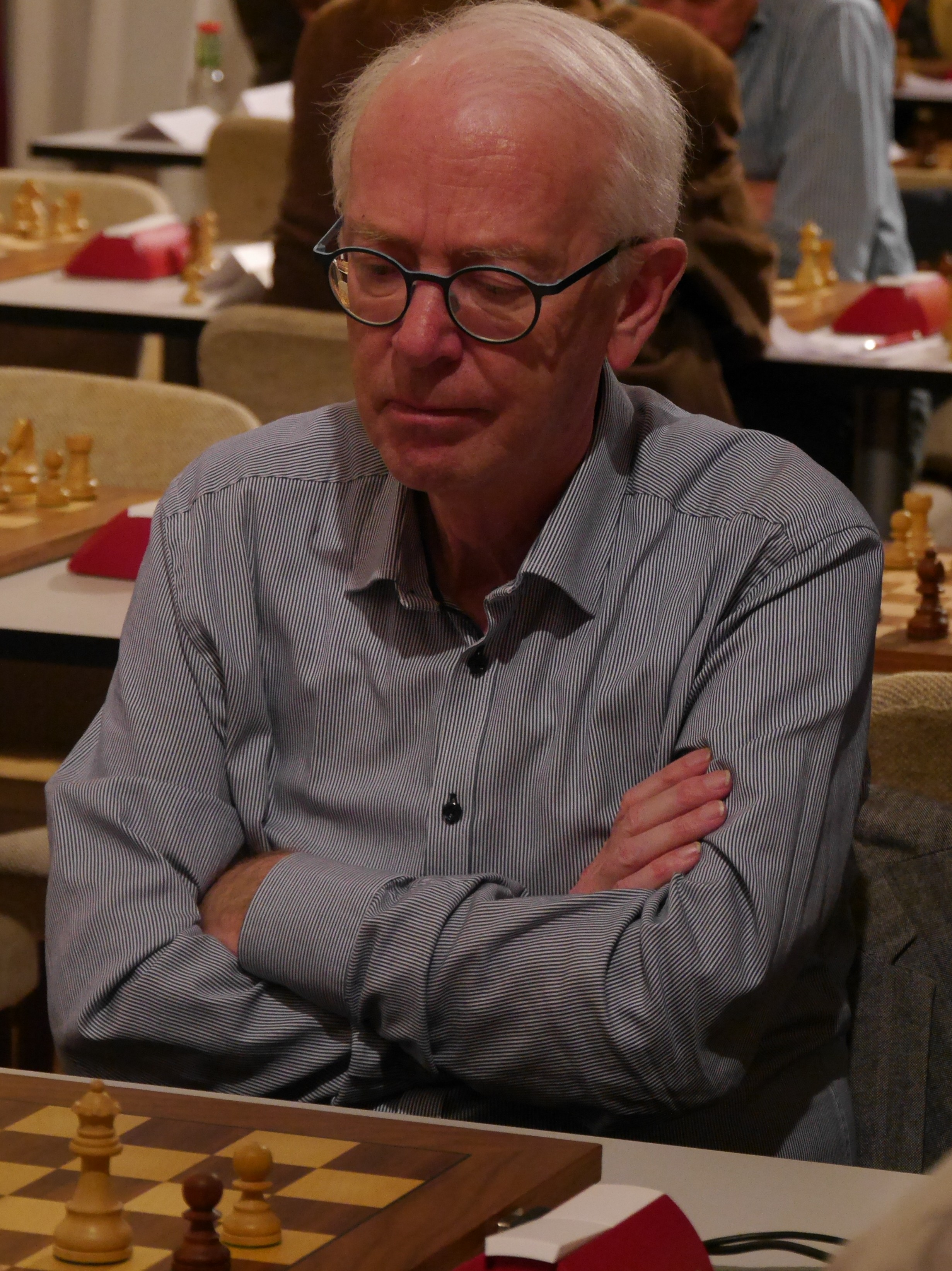 Jørn Sloth, Schachweltmeisterschaft der Senioren in Marienbad